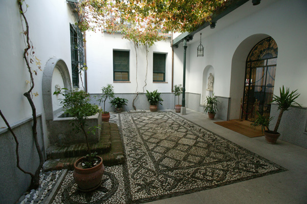 Vista de patio. Museo del Romanticismo.